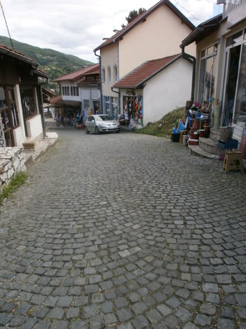 Чаршија у Фочи This image was uploaded as part of Trace of Soul 2015.